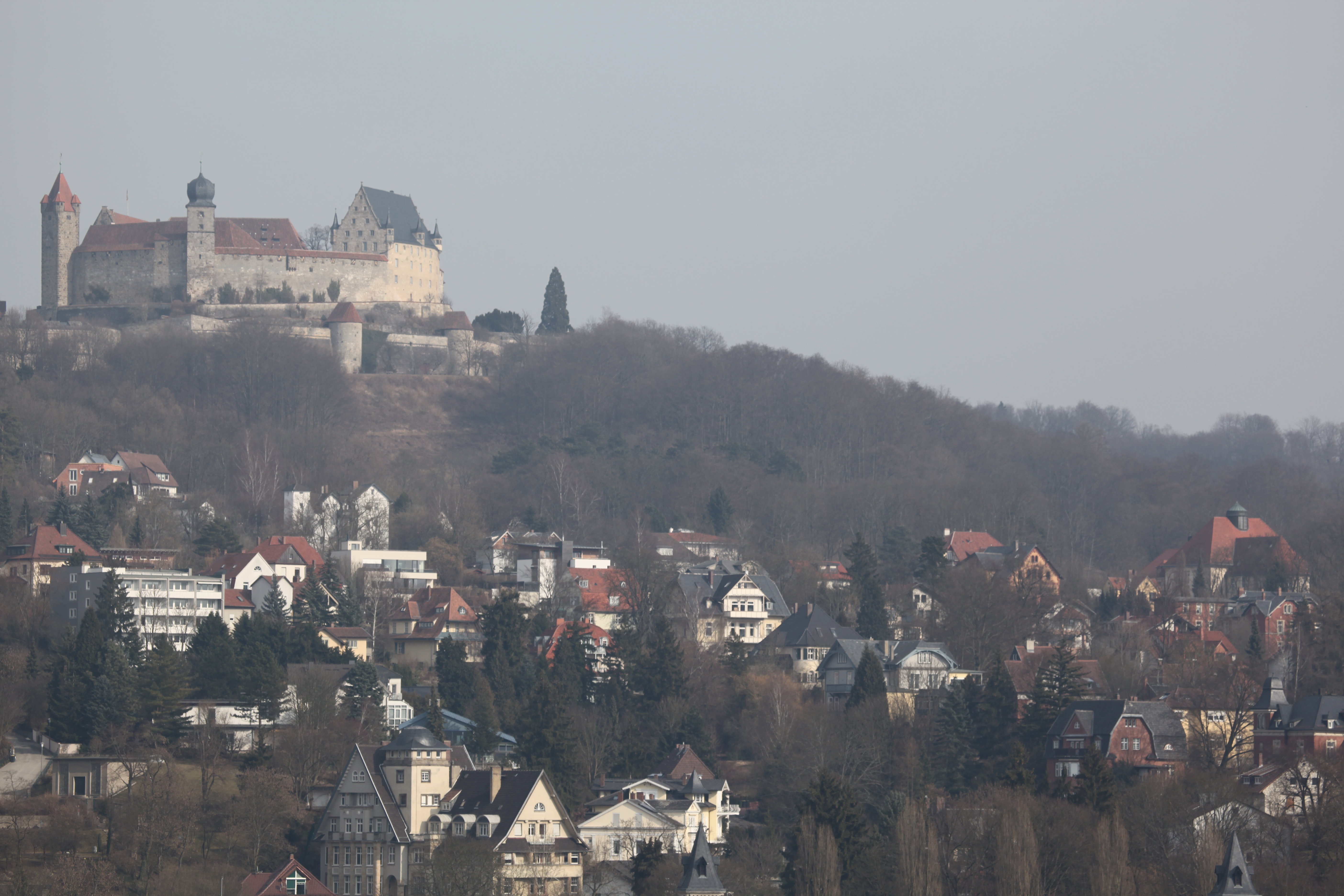 Festungsberg in Coburg